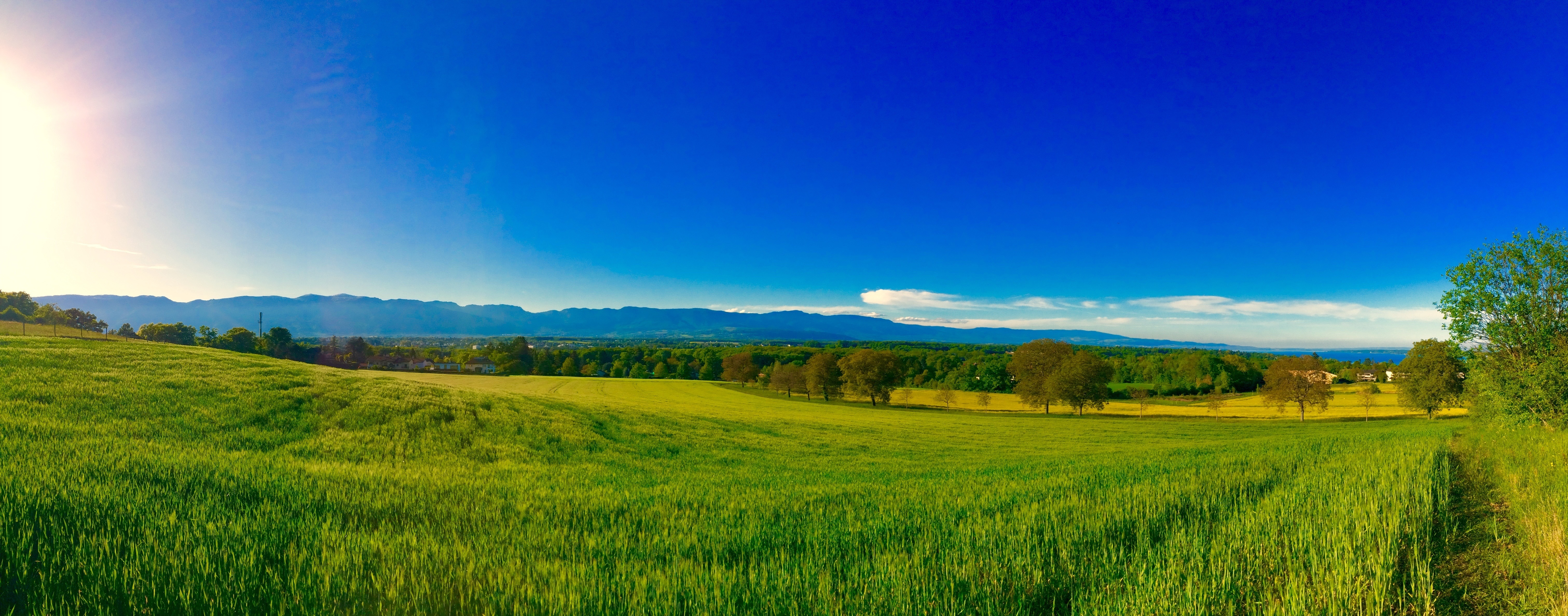 Panorama de la Campagne de Tournay, à Pregny-Chambésy, dans la campagne genevoise.